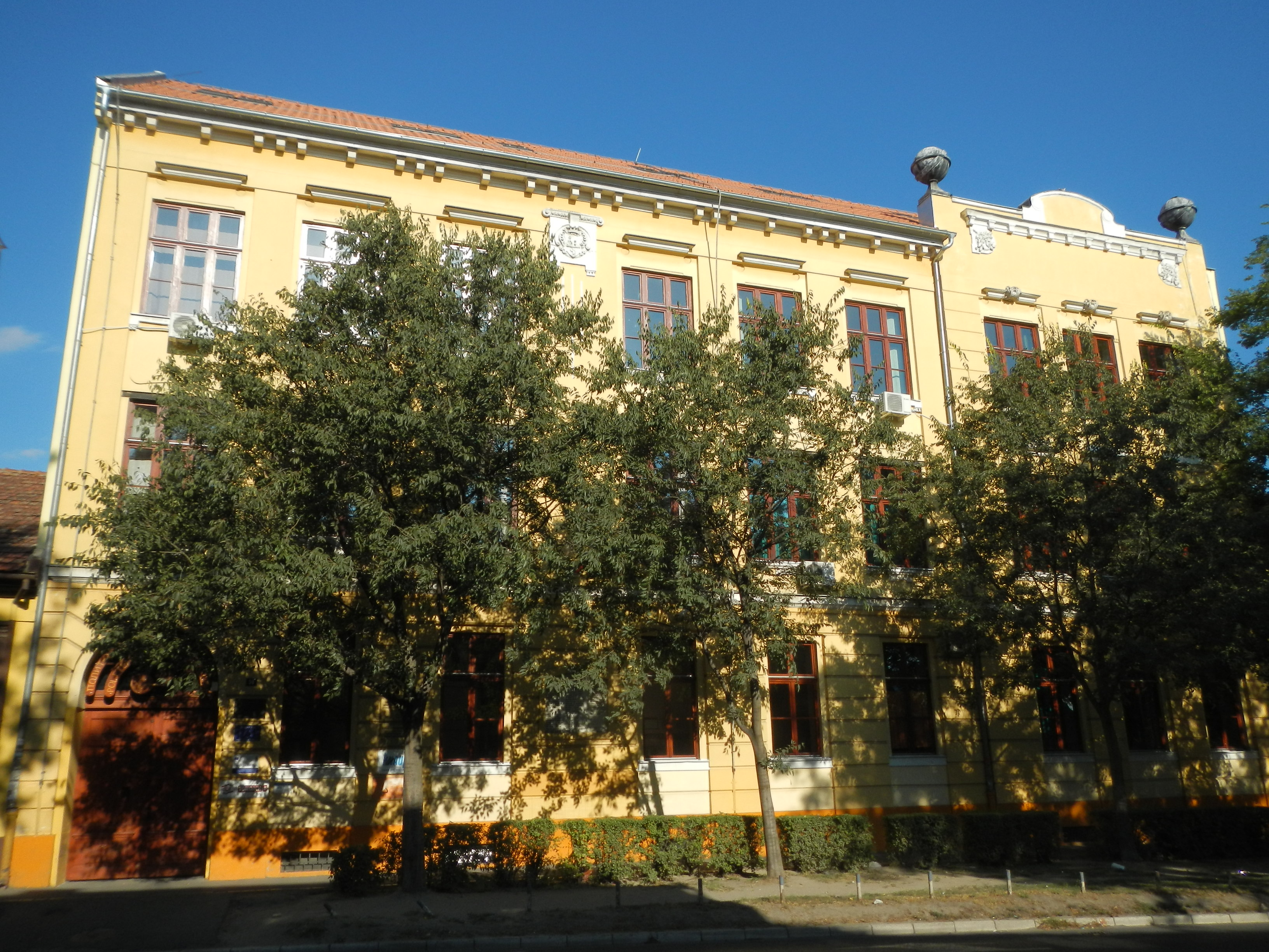 Објекат је грађен у периоду од 1910. до 1912. године за образовне намене, са стилским карактеристикама касне геометријске сецесије. Одлуком Председништва Народне скупштине АП Војводине 8.6.1945. године основана је Техничка школа у Суботици на локацији Максима Горког 38 (тадашњој Вилсоновој 38). После школске реформе 1977. године у овој згради се налазила Гимназија, све до 1992. године, од када се налази данашња Политехничка школа „18. новембар“.